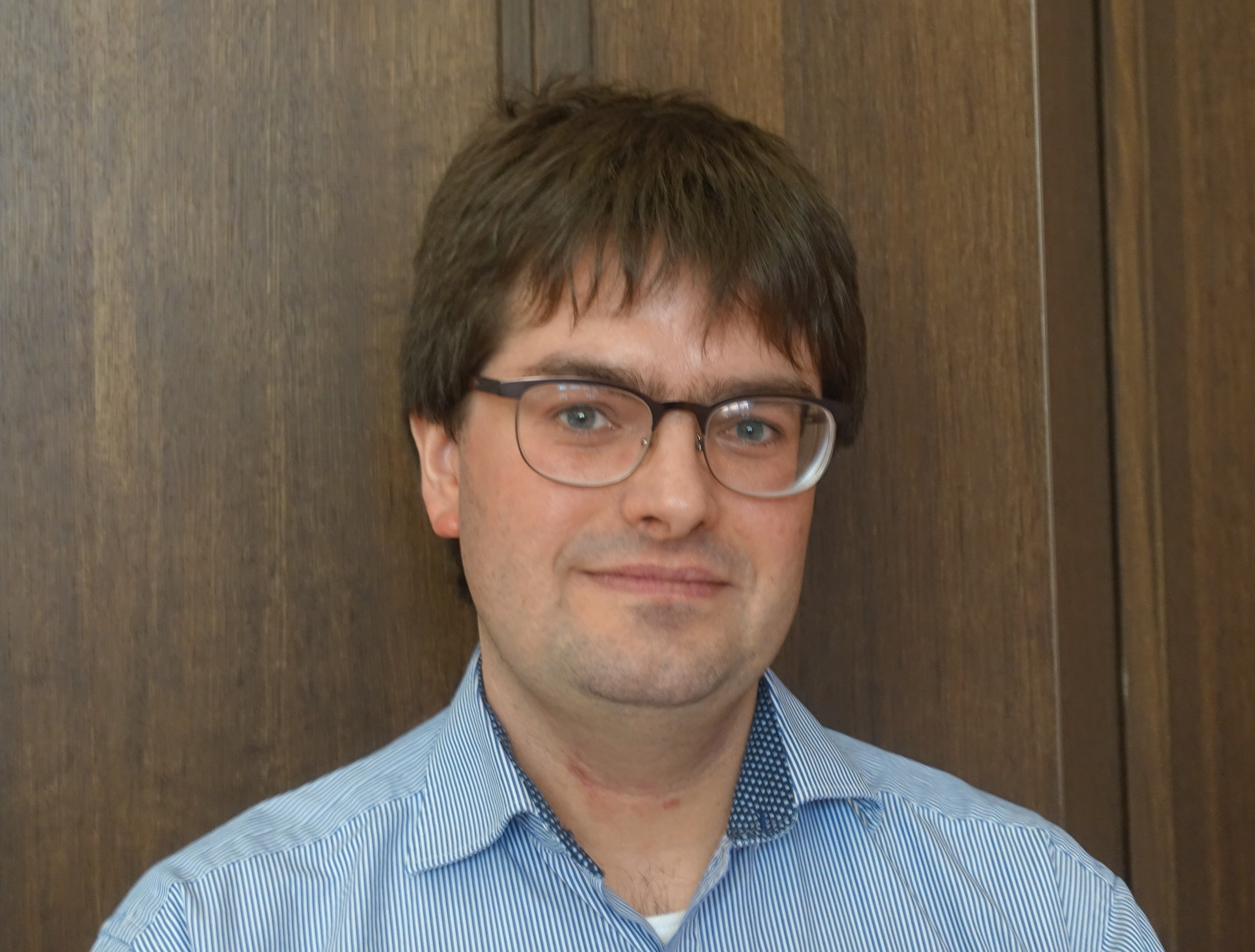 Tim Golke, ehemaliger Politiker und jetzt hauptberuflich bei der Gewerkschaft ver.di in Hamburg